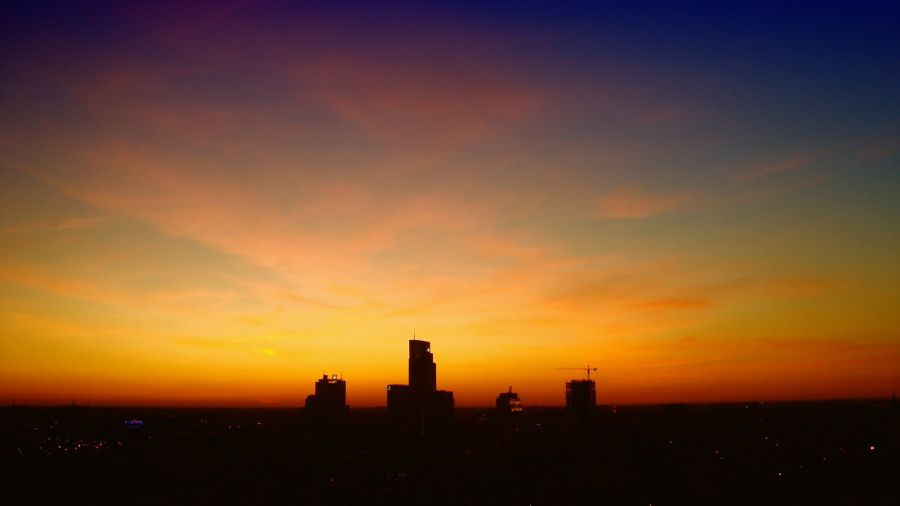 Widok na Wole z Orco Tower latem 2009